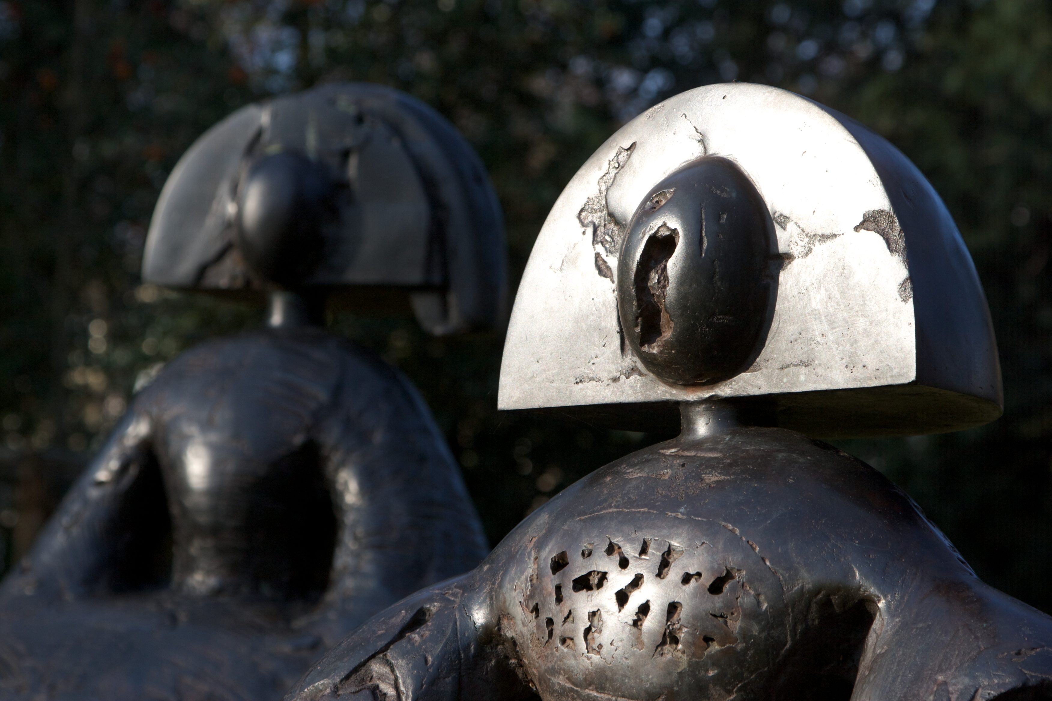 Manolo Valdés, Las Meninas, Bronze 2006, Düsseldorf, Hofgarten (Detail)